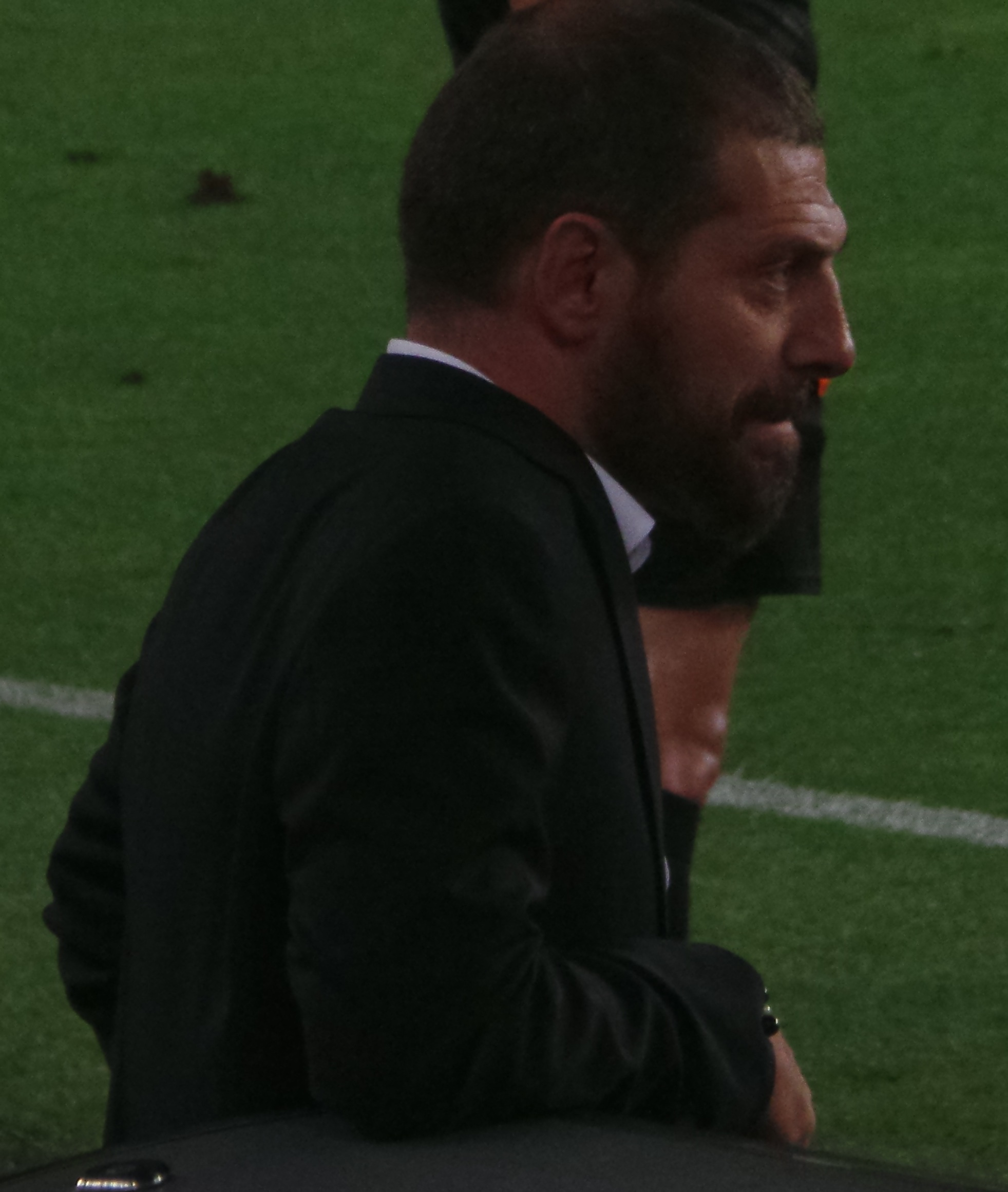 Slaven Bilic